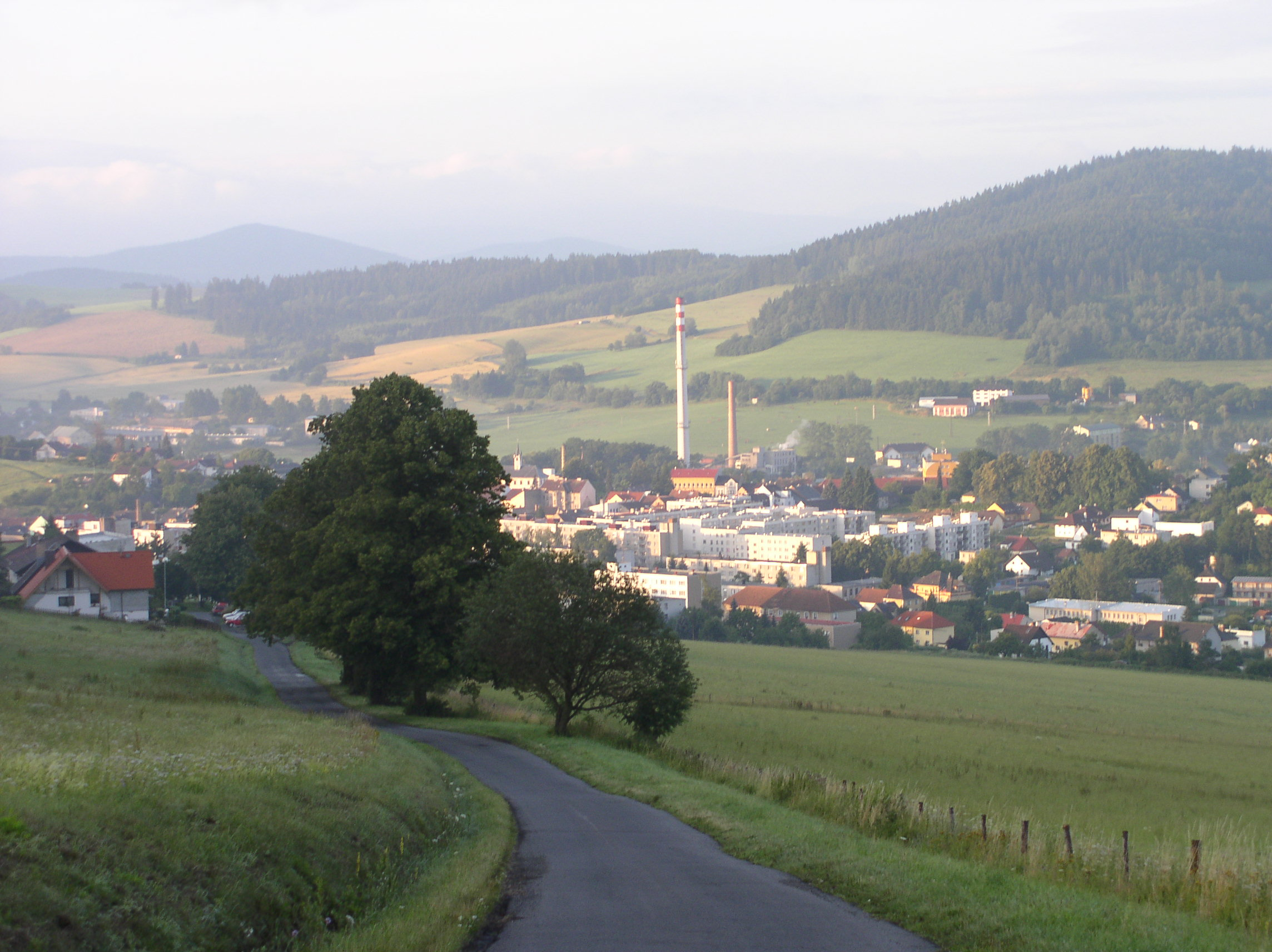 City Kdyne in the Czech Republic. Kdyně - pohled ze severu (od Podzámčí)